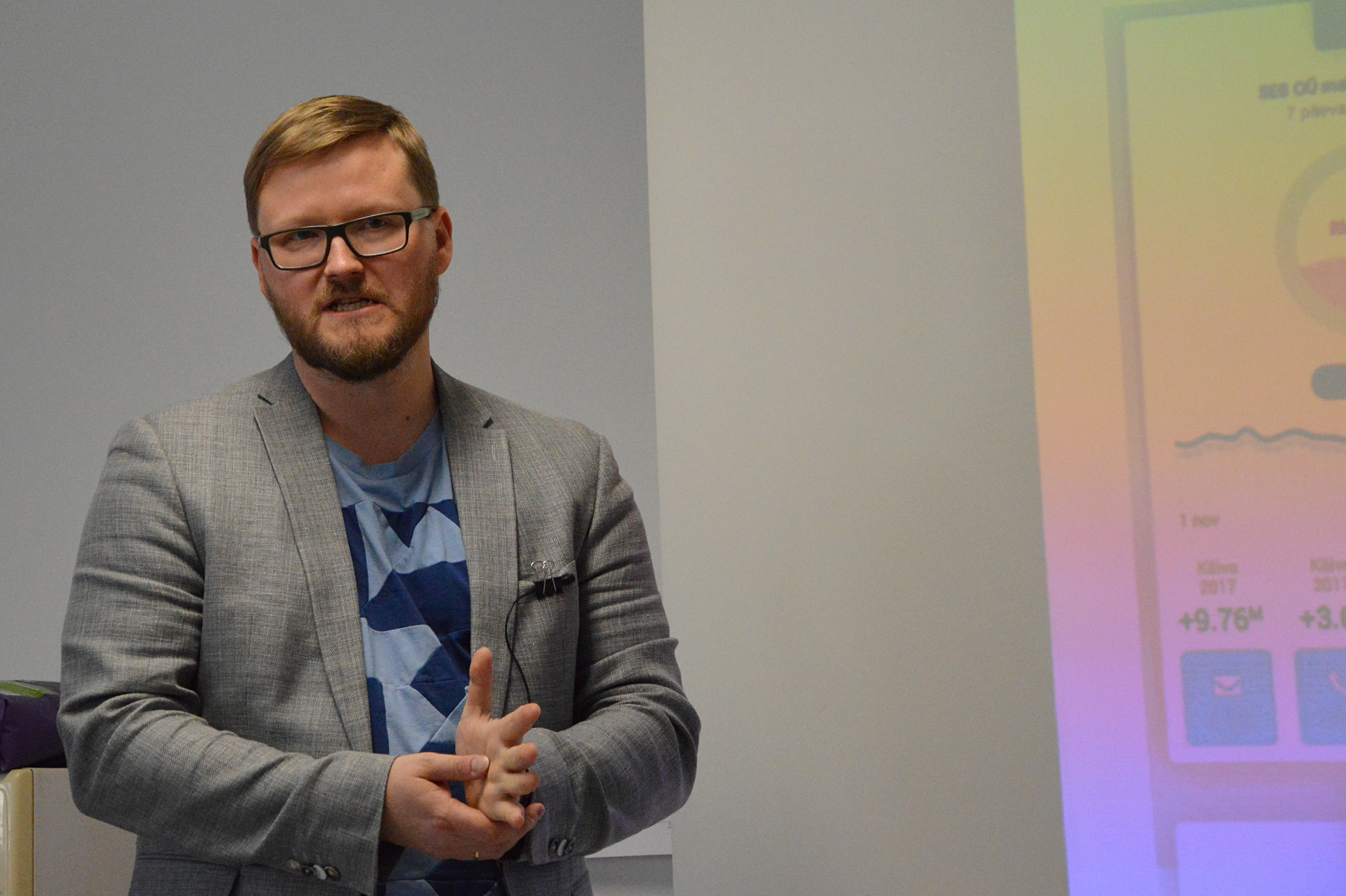 Avaandmete päev Tallinnas. Kõneleb Peep Küngas.